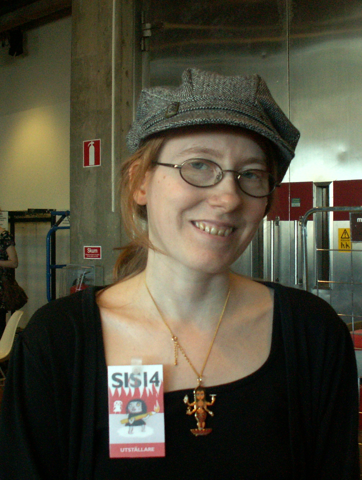 Li Österberg vid Stockholms internationella seriefestival 2014.